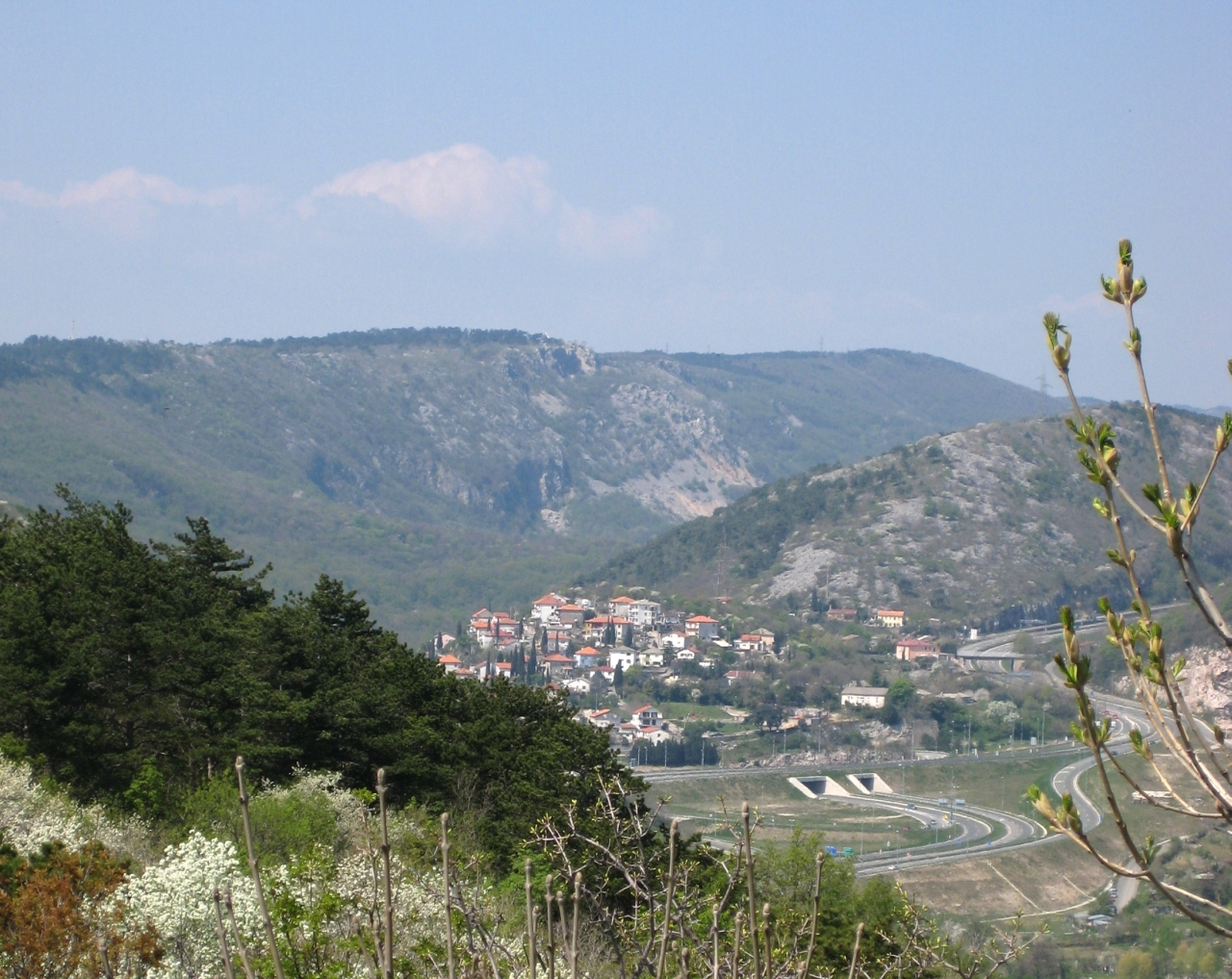 Orehovica.